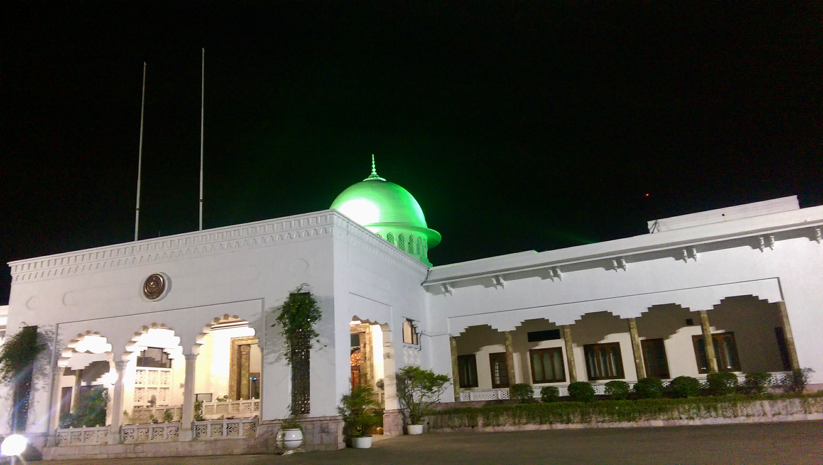 বঙ্গভবন, গণপ্রজাতন্ত্রী বাংলাদেশ সরকারের মহামান্য রাস্ট্রপতির বাসভবন।